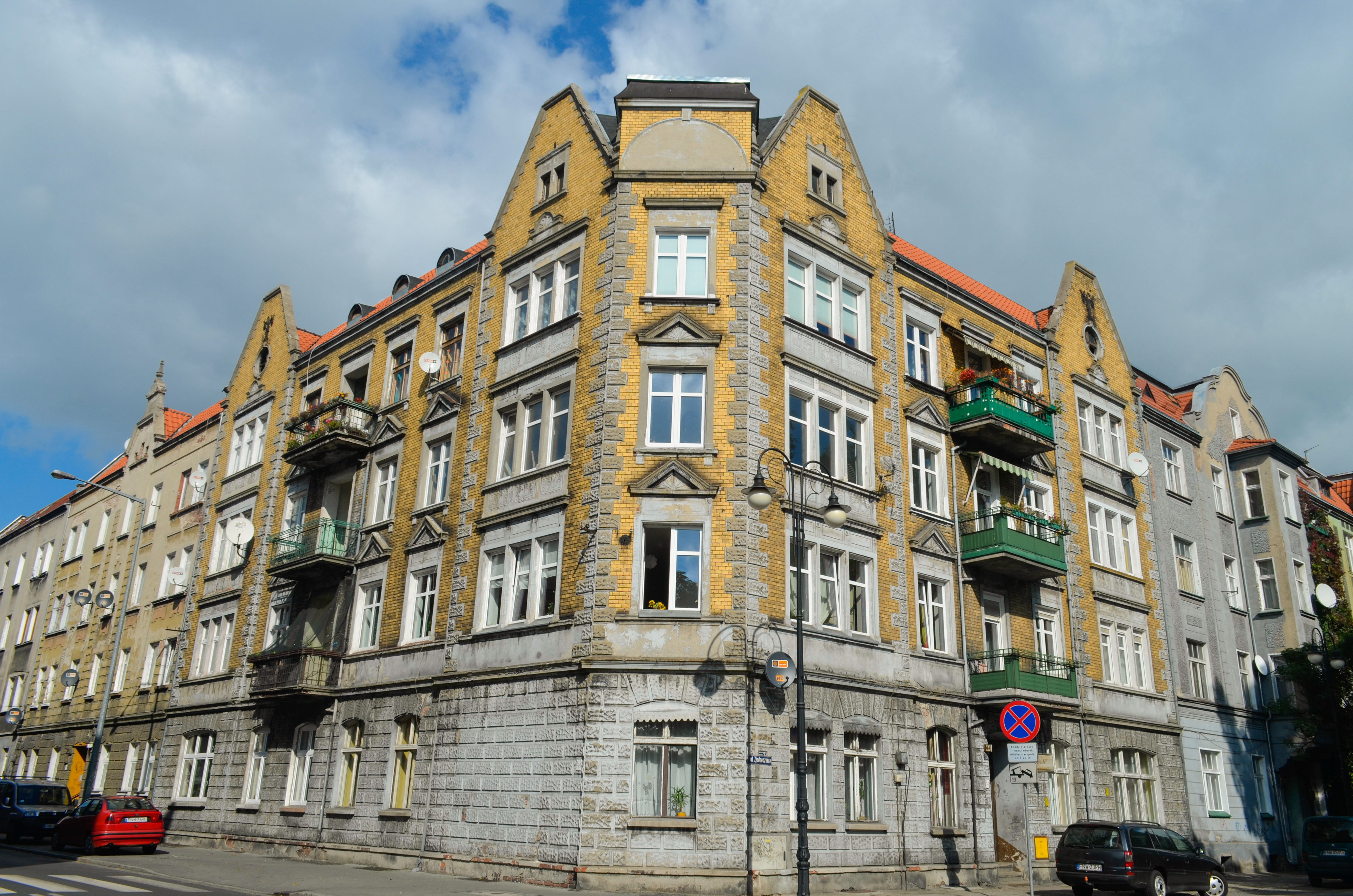 Nowa Sól, dom